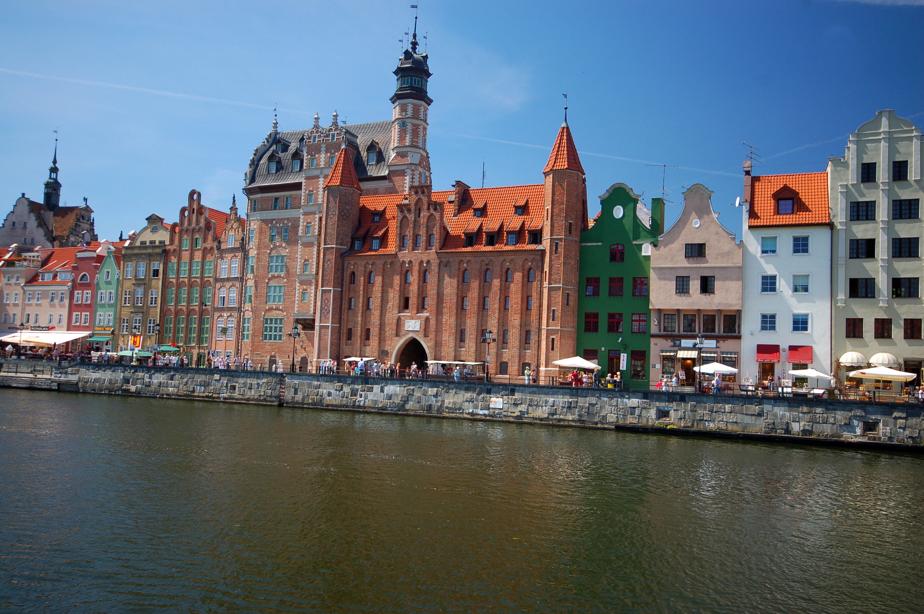 Wikimania Gdansk 2010